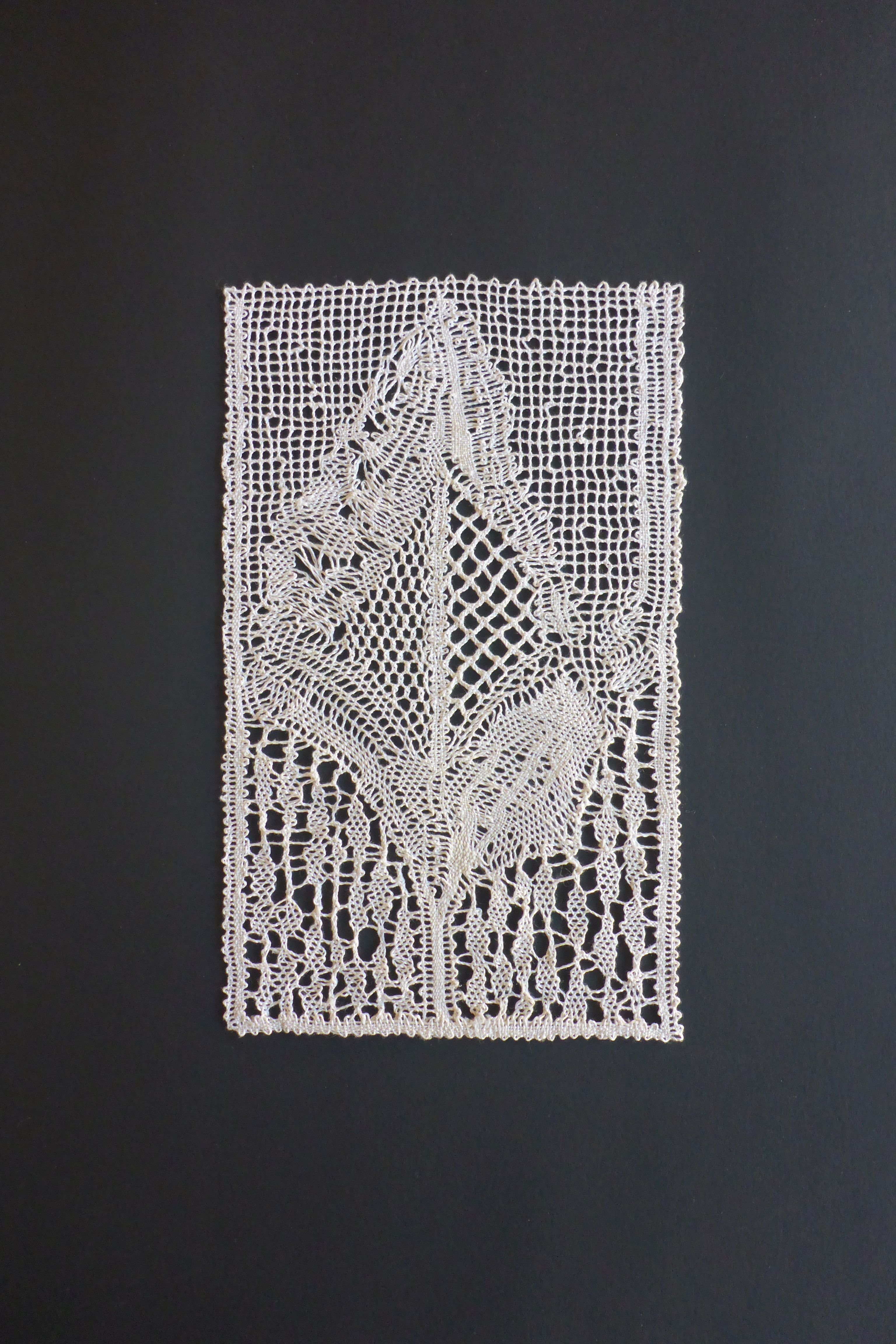 Klöppelspitze